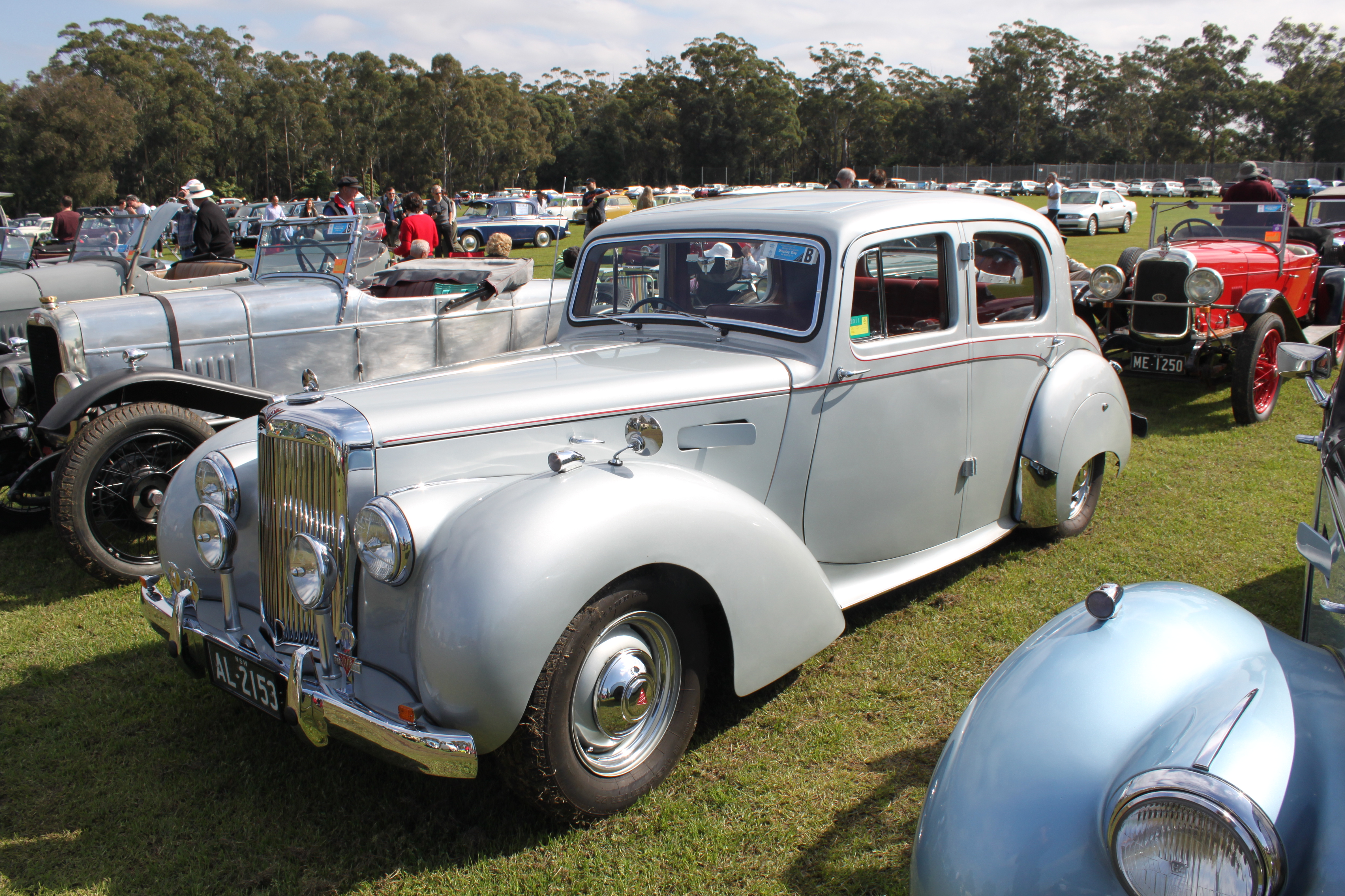 Alvis TC21